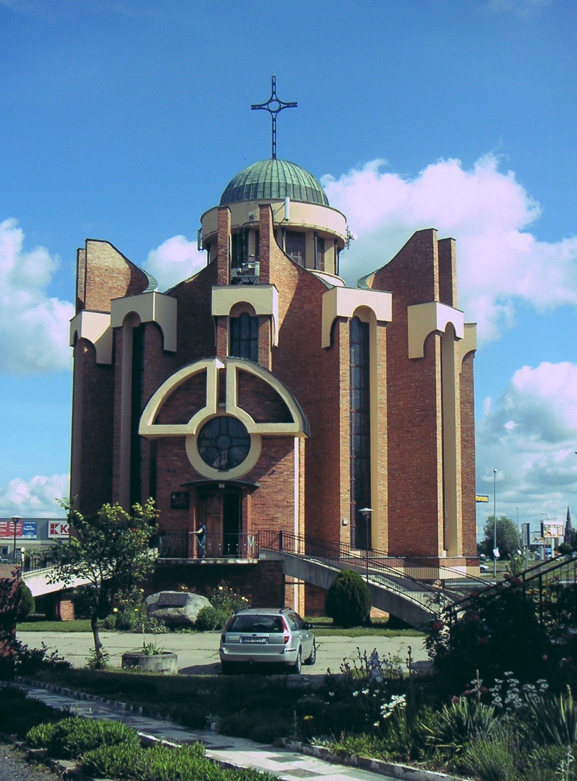 Szczecin-Słoneczne, Sanktuarium Pani Fatimskiej Słonecznej Królowej. ul. Struga 61